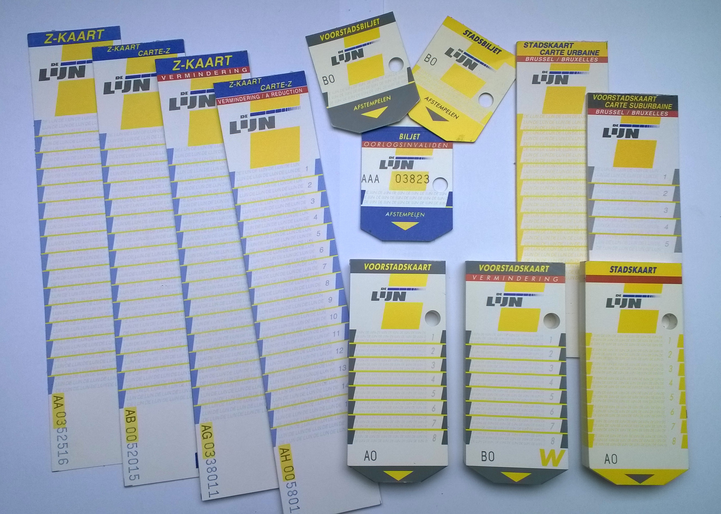 Diverse kartonnen vervoerbewijzen die in gebruik waren bij het begin van De Lijn